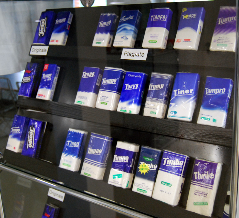 Plagiate des Tempo-Taschentuchs im Plagiarius-Museum.